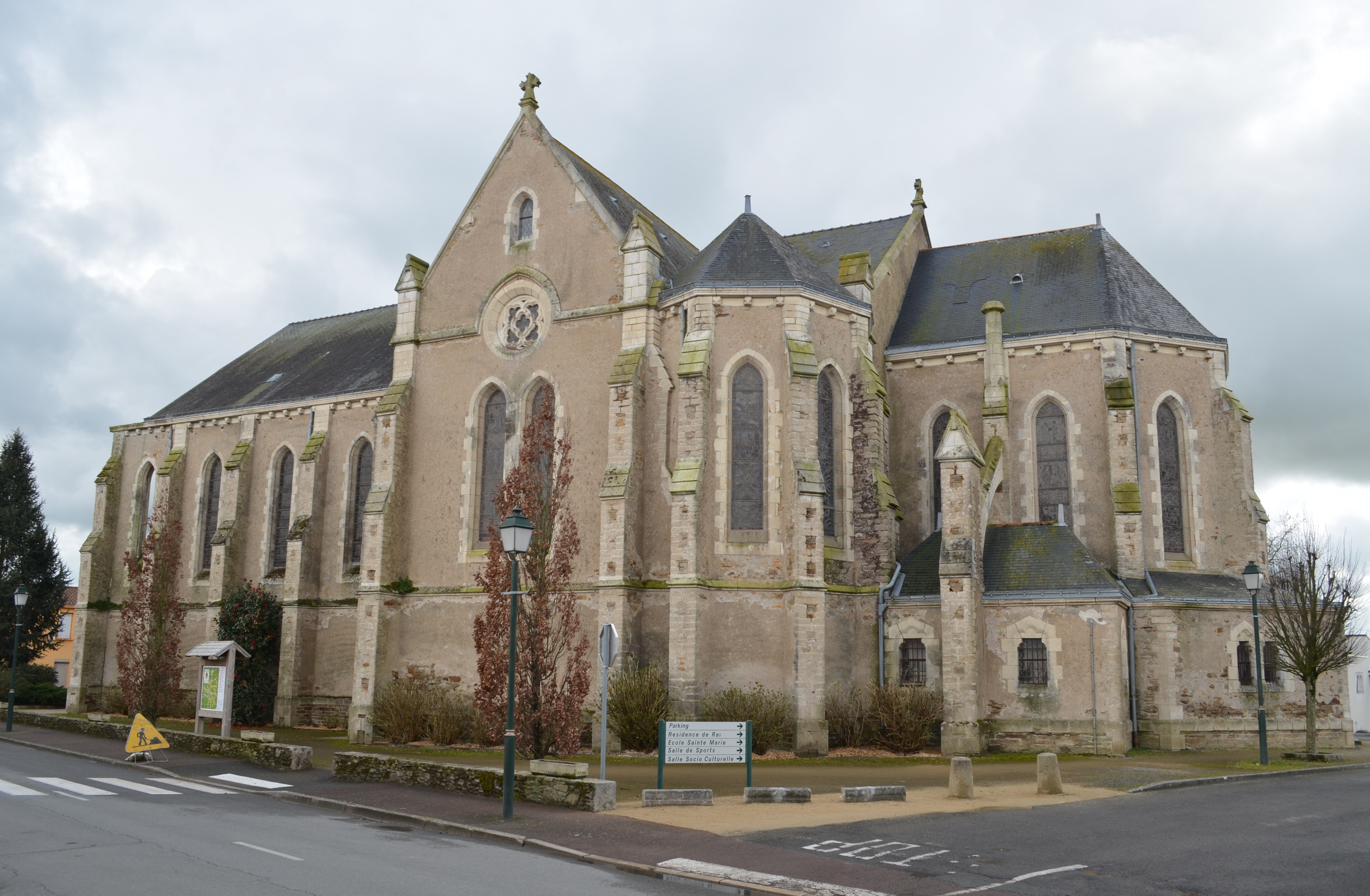 Eglise de Saint-Étienne-de-Mer-Morte - Loire-Atlantique